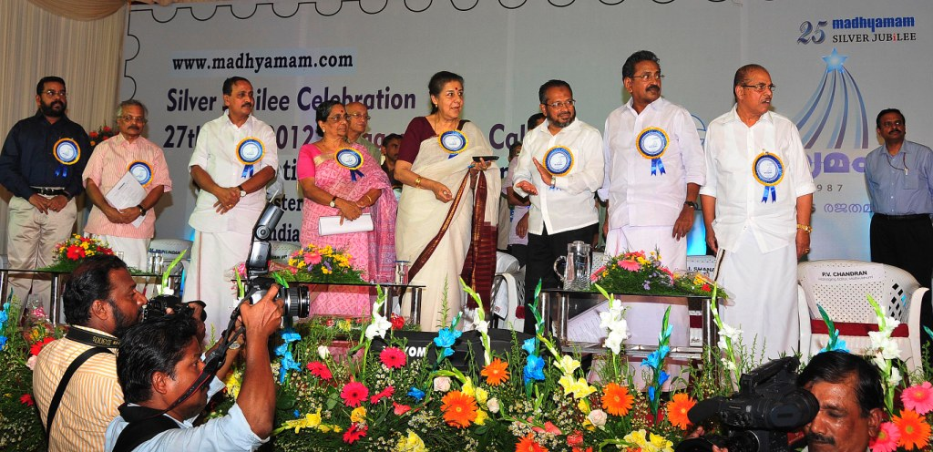 മാധ്യമം സിൽവർ ജൂബിലി വേദി